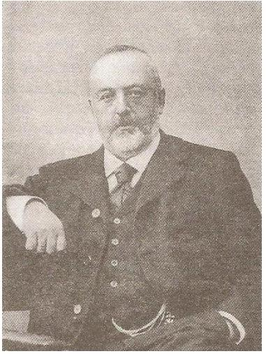 Фотография